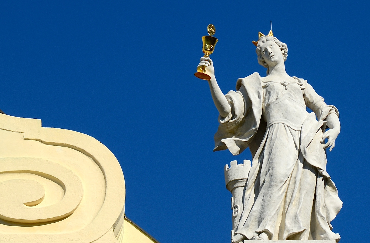 Heilige Barabara, Bergkirche Ronaun